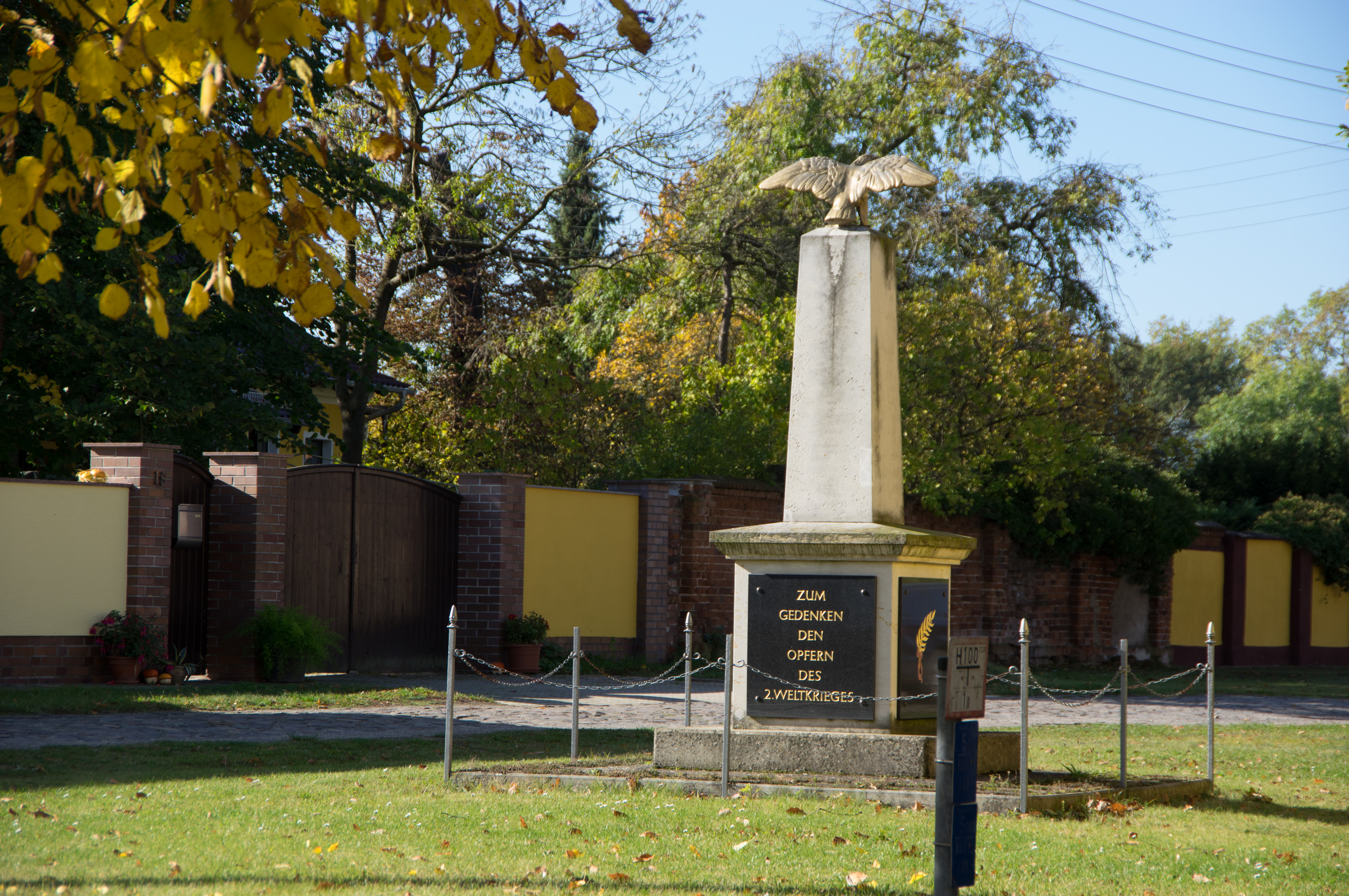 Kolochau ein Ortsteil von Kemitzaue in Brandenburg. Das Kriegerdenkmal für die Gefallenen des Zweiten Weltkrieges.